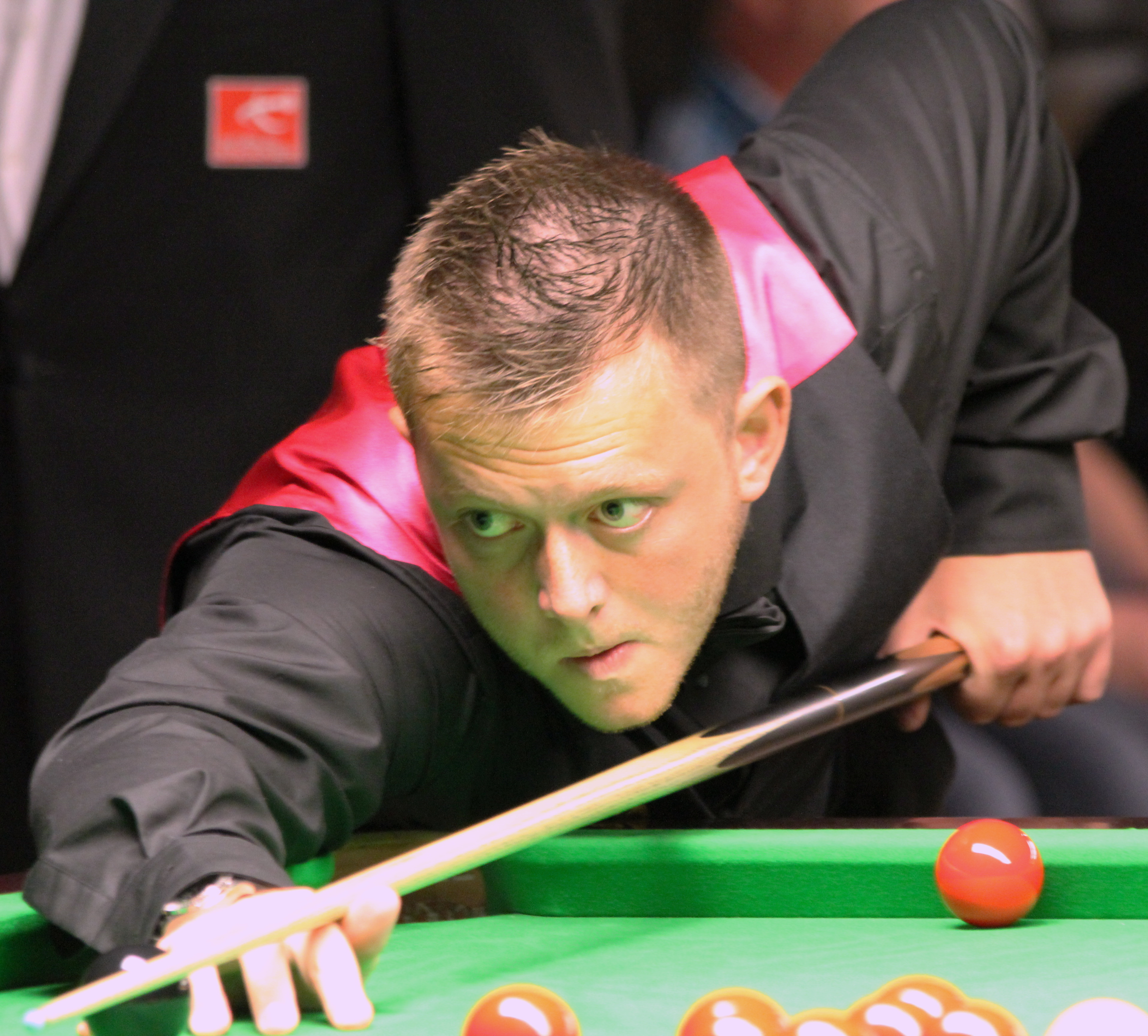 Mark Allen beim Paul Hunter Classic 2012